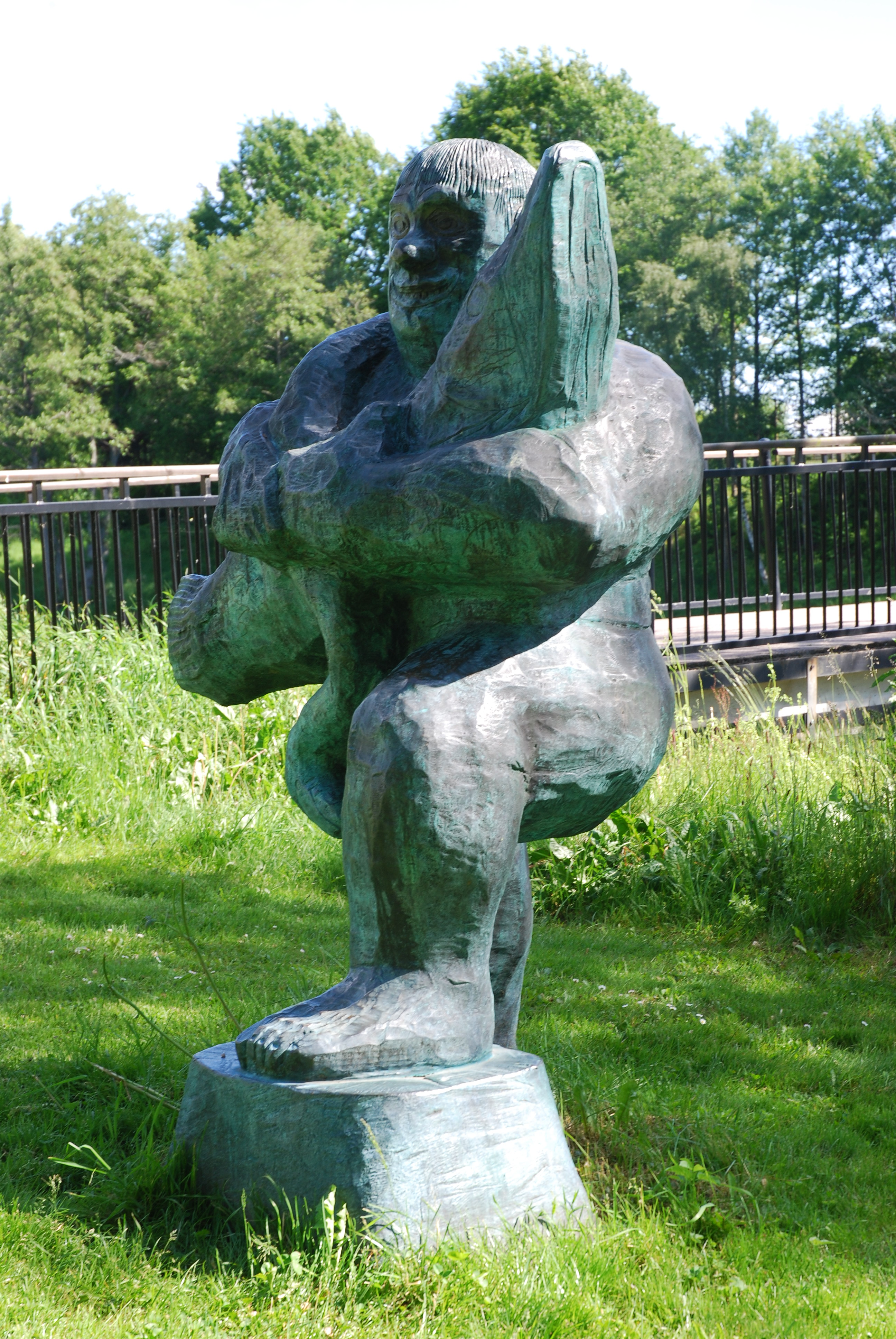 Sven Ljungberg' s Ågubben, at the river Lagan, Ljungby, weden